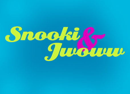 Logo der Reality-TV-Serie Snooki & JWoww